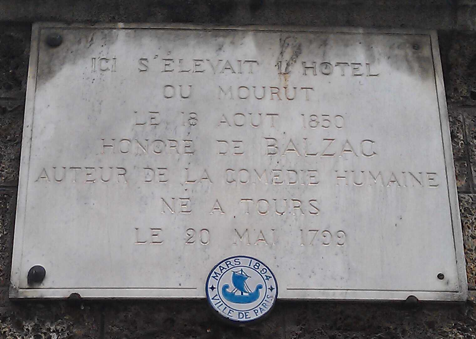 Hôtel Salomon de Rothschild . This photo was uploaded with Wiki Loves Monuments mobile 1.2.1 (Android).